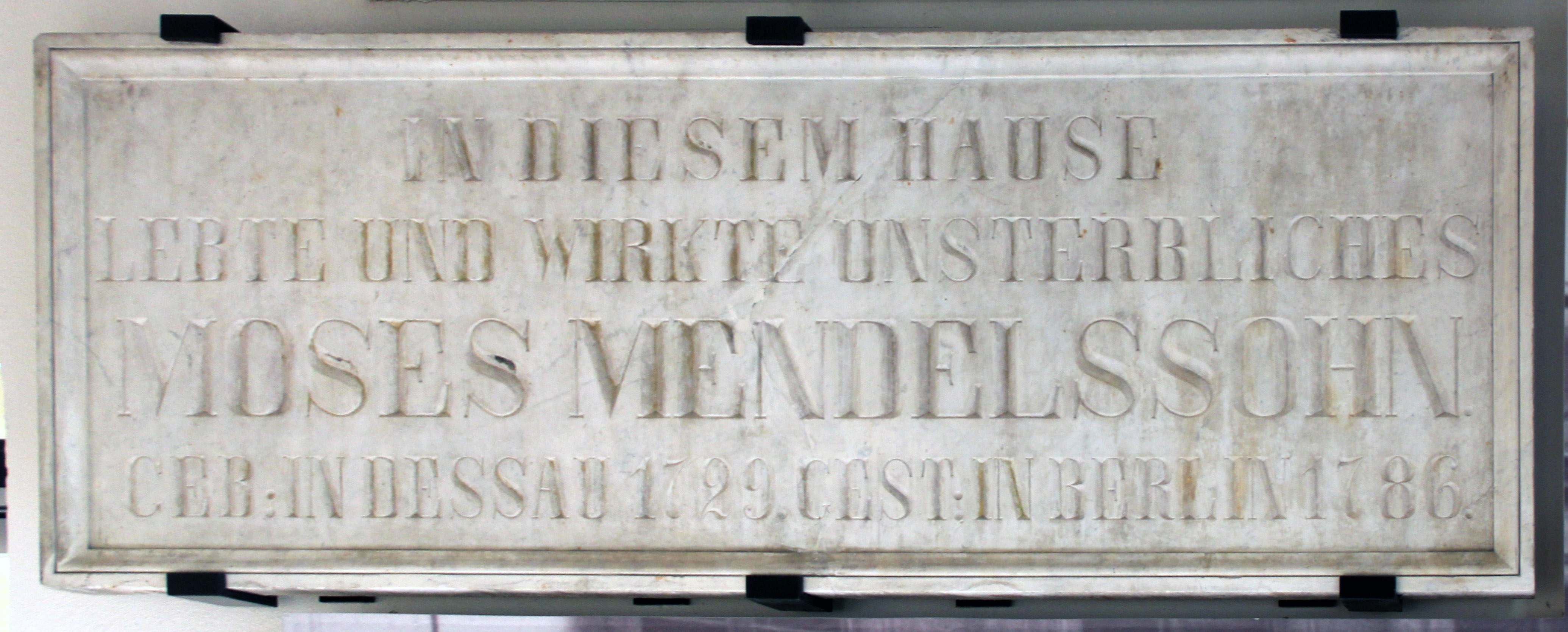 Original Gedenktafel, Moses Mendelssohn, vom ehemaligen Wohnhaus Spandauer Straße 68 in Berlin-Mitte. Heutiger Standort Mehringdamm 21, Berlin-Kreuzberg, Deutschland